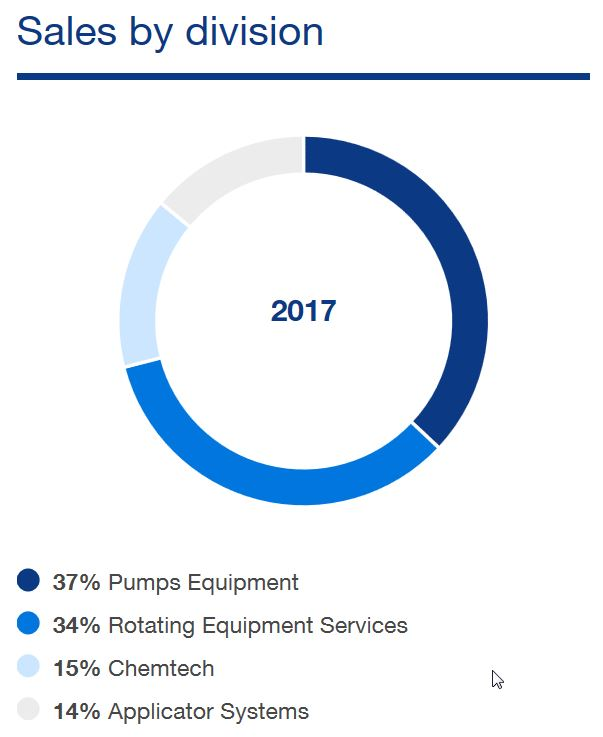 Umsatz nach Divisionen